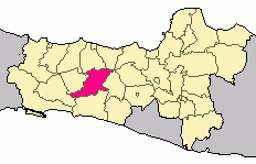 Banjarnegara in Central Java